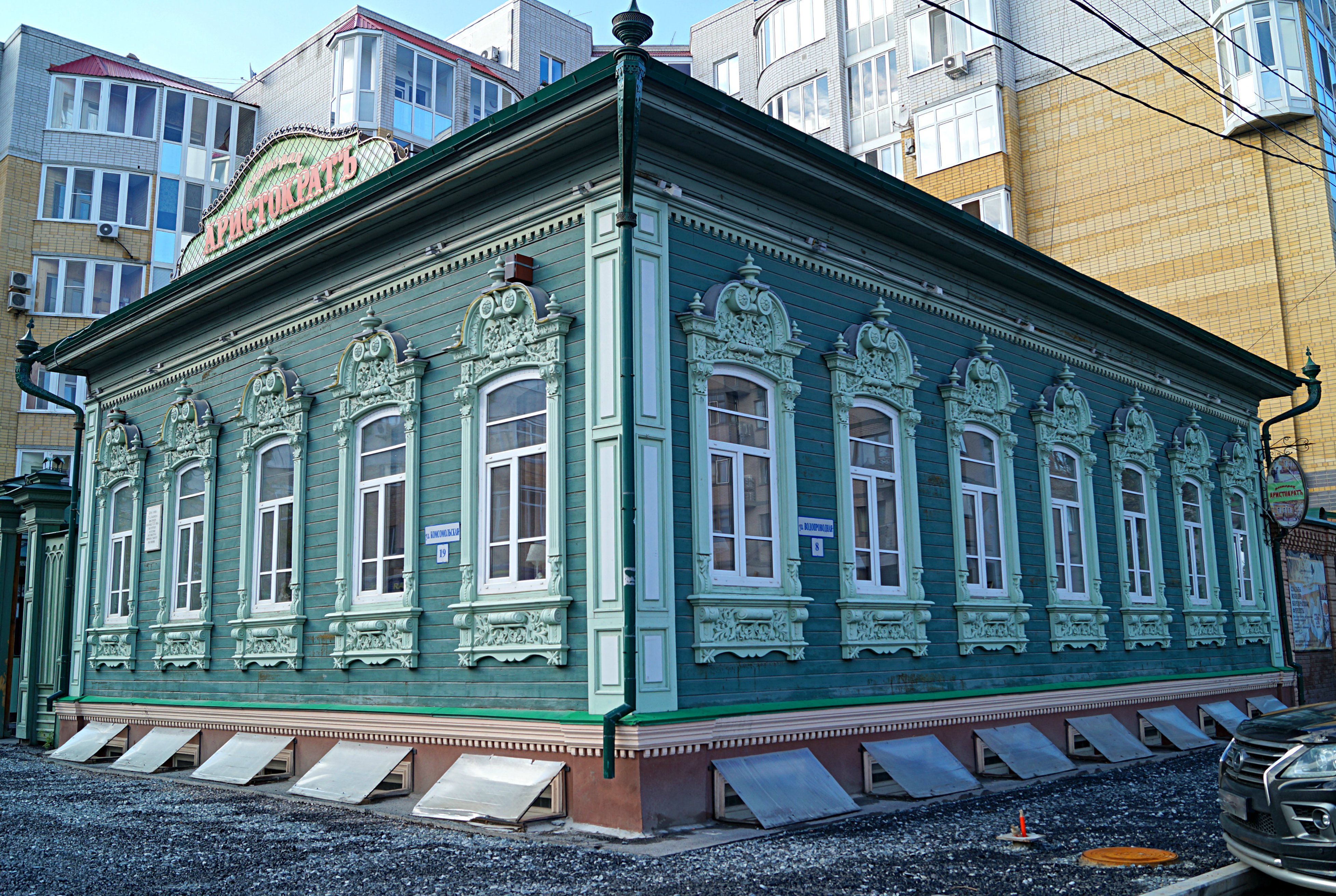 Жилой дом: улица Водопроводная, 8 / улица Комсомольская, 19, Тюмень, Тюменская область